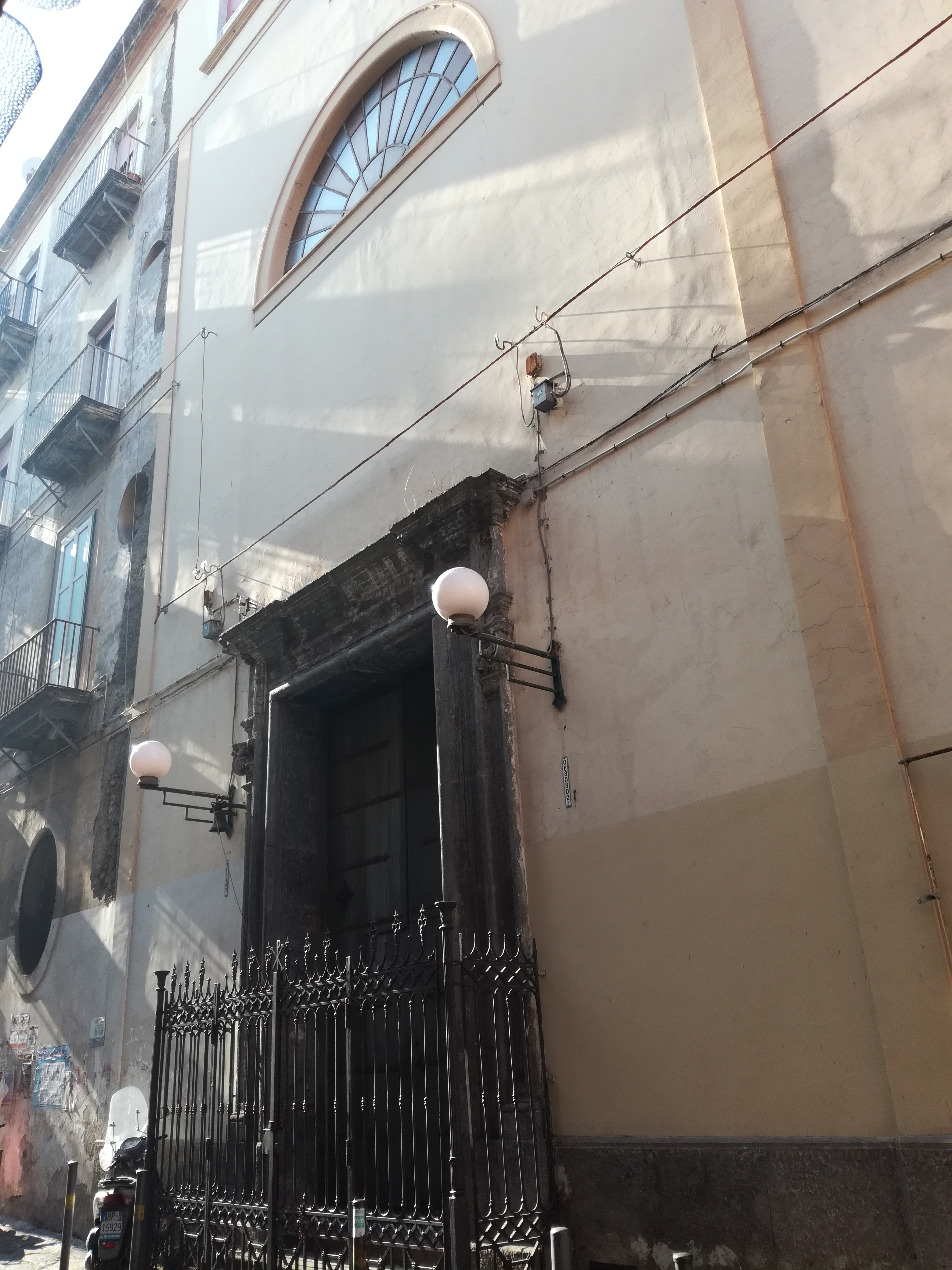 Chiesa di Santa Monica (Napoli, via Santa Monica)